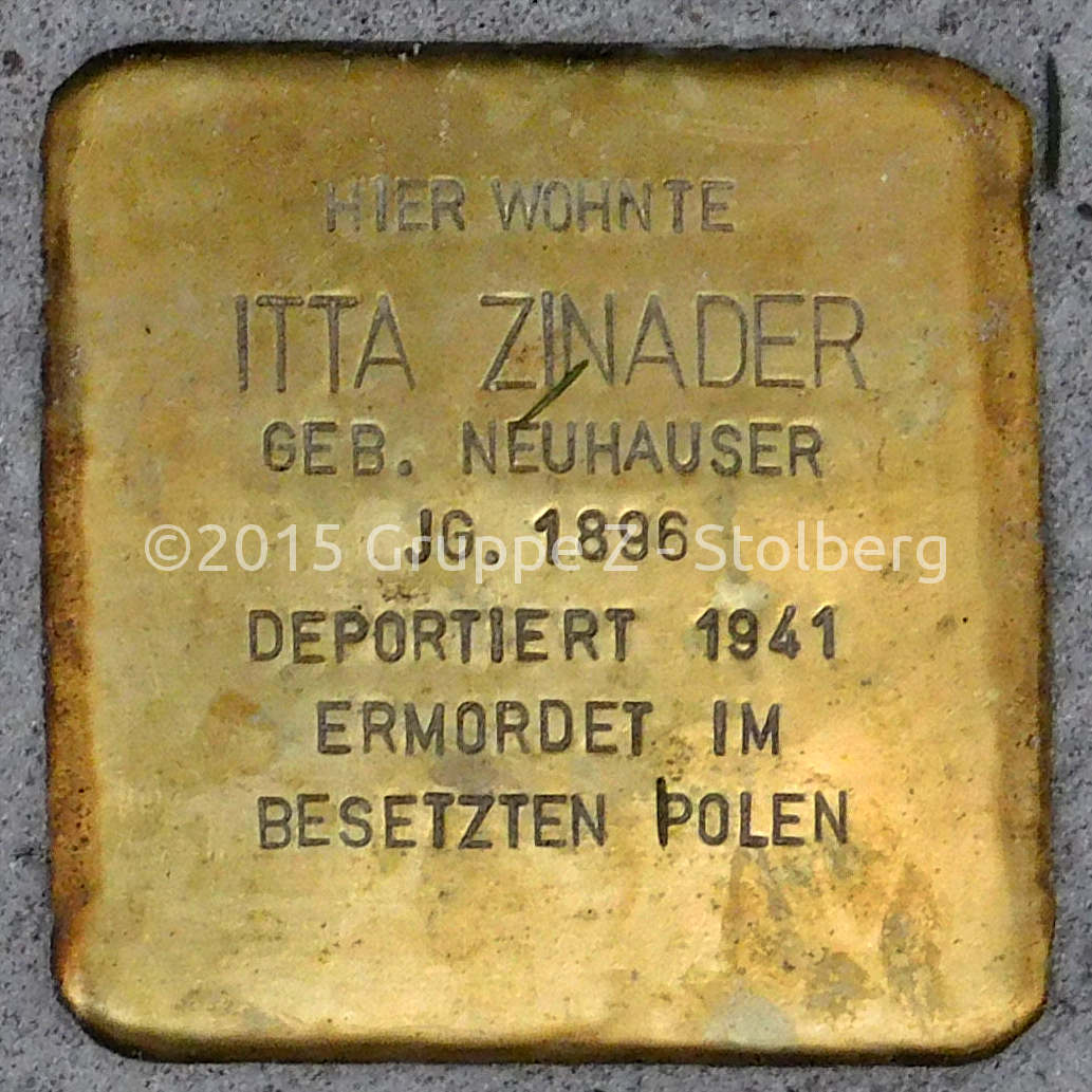 Stolperstein für Itta Zinader verlegt am 18. Dezember 2015